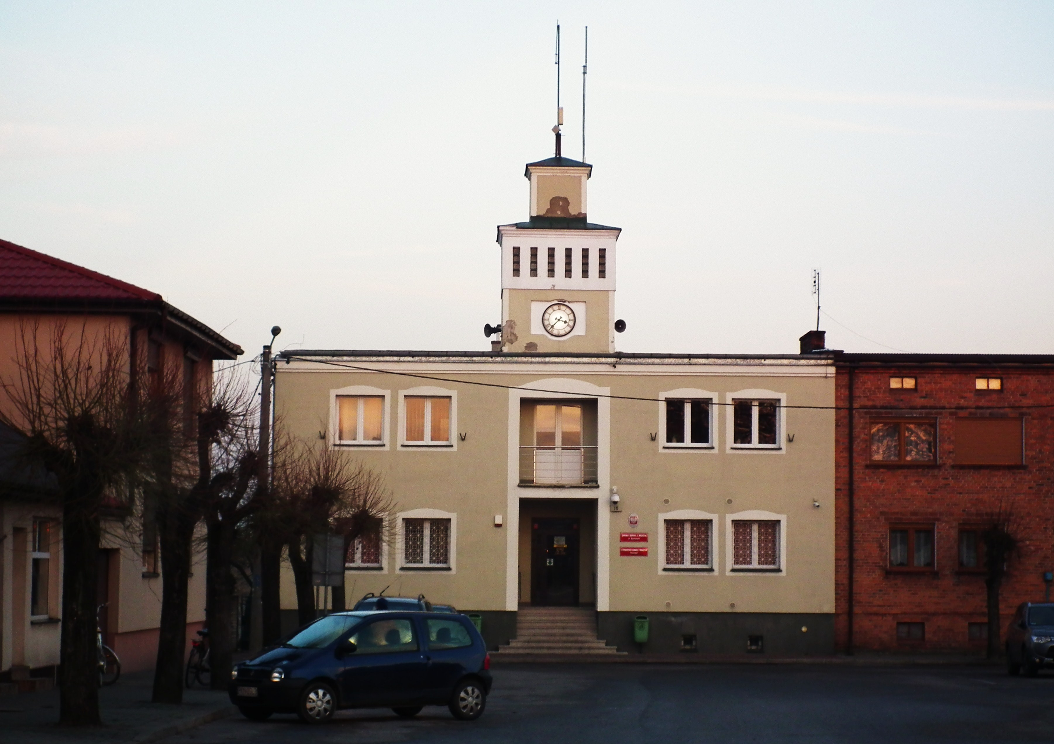 Ratusz w Rychwale na rynku.